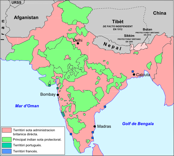 Division de la peninsula indiana en 1939.